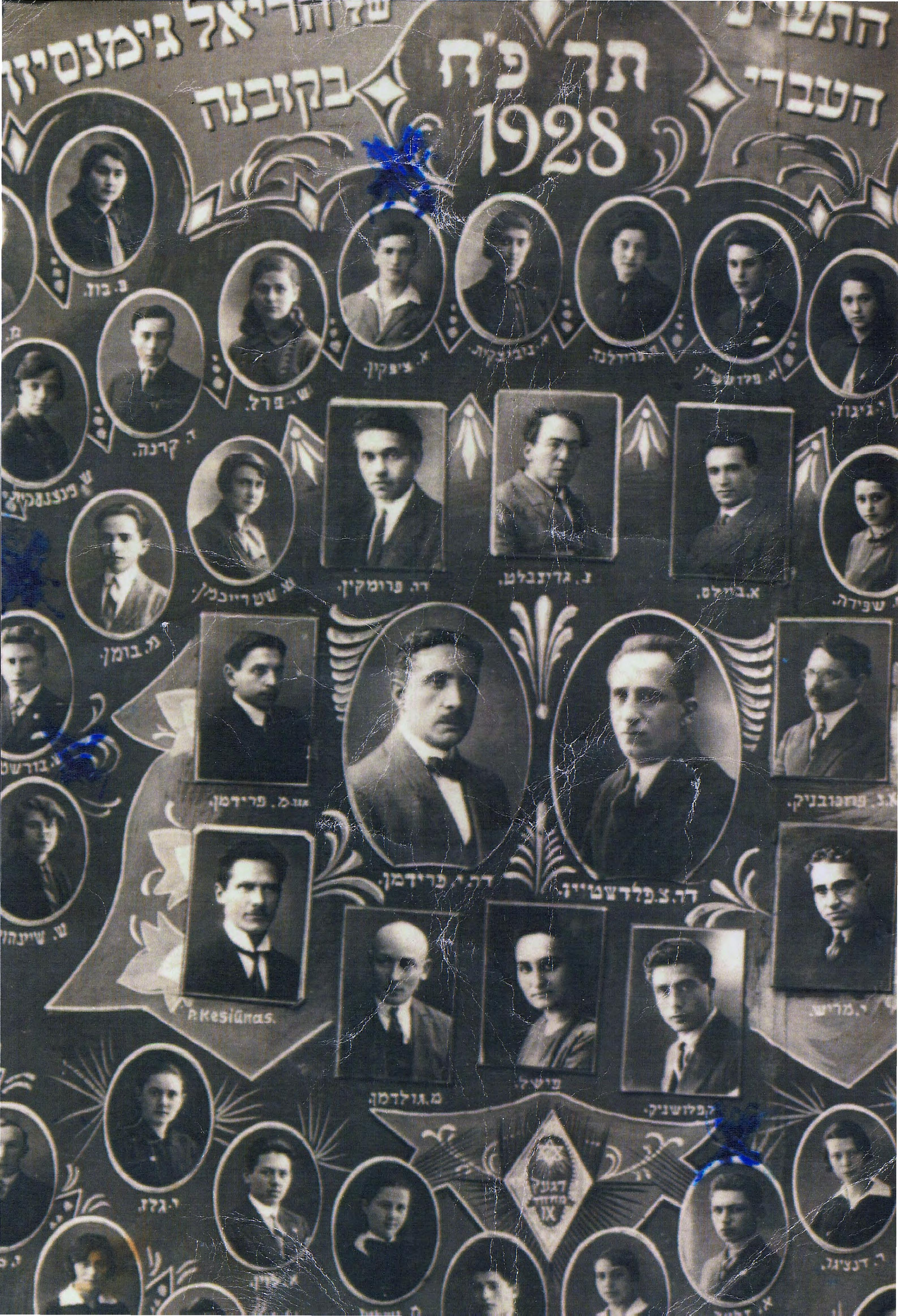 תמונת מחזור ט' של הגימנסיה הריאלית העברית בקובנה, תרפ"ח-1928. המורים שבתמונה: אליהו ביילס, אפרים נחום פרוכובניק, יעקב מריאש, קפלושניק, ארנה פישל, משה גולדמן, P. Kesiūnas, מרדכי פרידמן [אלישיב], אהרון (אלתר) פרוּמקין, נתן גרינבלט [גורן]; במרכז: המנהלים צמח פלדשטיין, יהושע פרידמן.